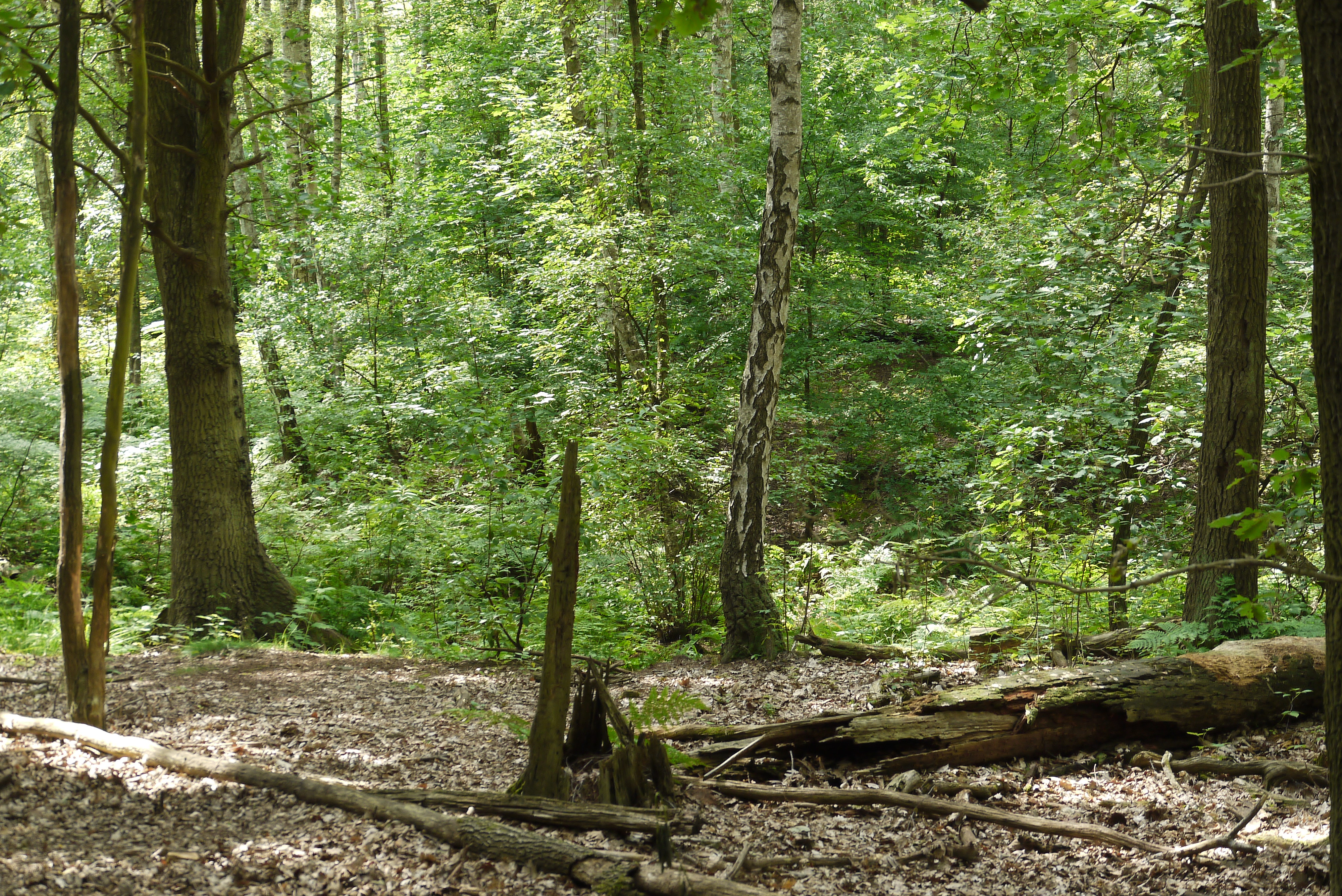 Das Postfenn ist ein zum größten Teil ausgetrocknetes Moor im Berliner Grunewald, westlich des Teufelsbergs gelegen. Es ist ein Naturschutzgebiet (NSG 10), das durch einen Holzzaun eingegrenzt und dem Besucher nicht zugänglich ist. Man kann es auf Waldwegen umrunden und von dort aus einsehen. Das Foto zeigt das Postfenn im östlichen Abschnitt. Man sieht den typischen Baumbestand von Moor-Birken und Stiel-Eichen, sowie im Vordergrund das Totholz einer Stieleiche.